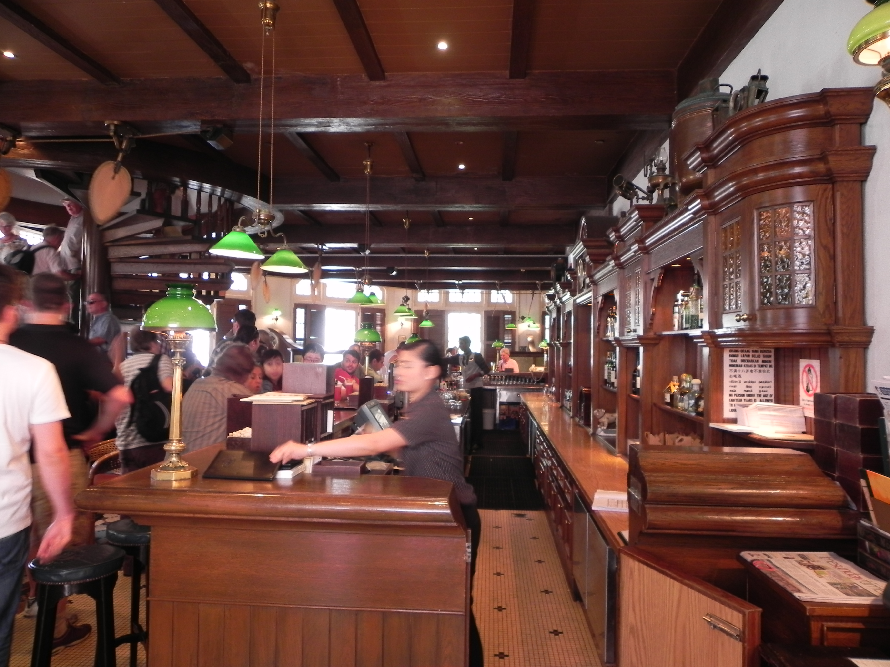 Singapur Raffles Hotel, Long Bar 1. Etage